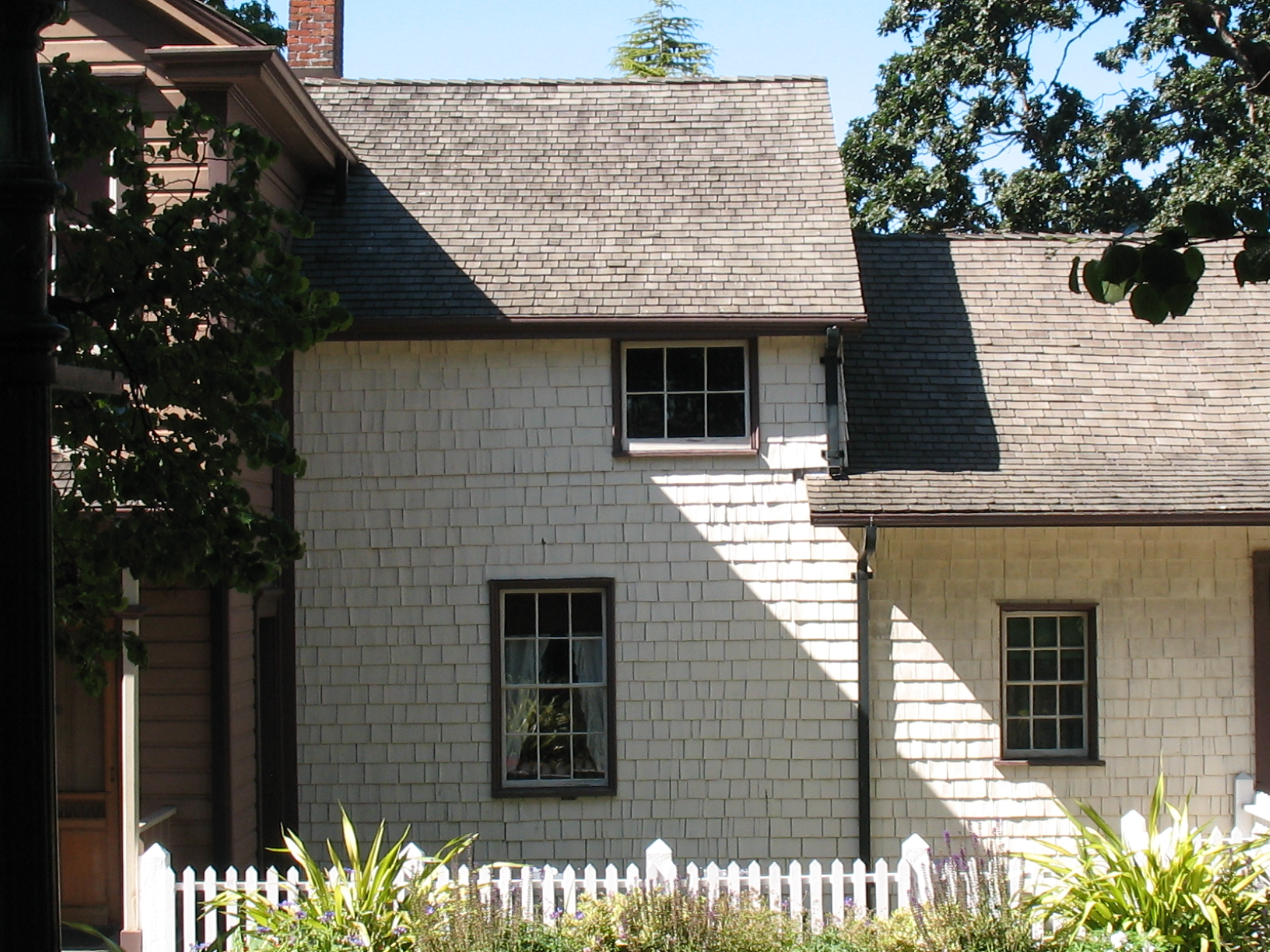 Erster Anbau am Helcken House in Victoria, British Columbia (Kanada)